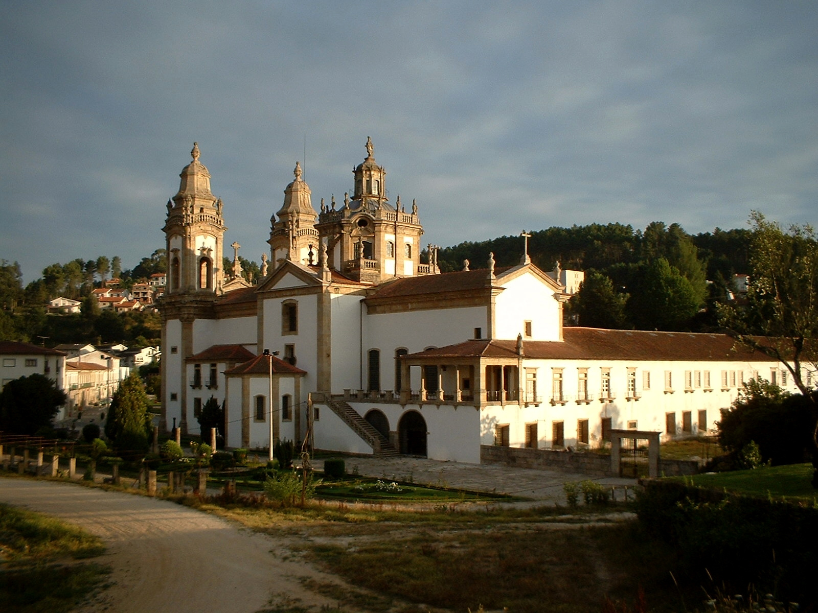 Esta imagem mostra o mosteiro de Sao Miguel de Refojos, em Cabeceiras de Basto e fui eu próprio quem tirou esta fotografia com a minha máquina Fujifilm. Devo dizer que já cedi esta mesma foto gratuitamente ao jornal Diário do minho que já a publicou mais que uma vez nas suas ediçoes. Francisco Miguel Rodrigues Descrição: vista alteral da igreja do Mosteiro de Sao Miguel de Refojos, em Cabeceiras de Basto Fonte e créditos: (Máquina fujifilm de Francisco Miguel Rodrigues)